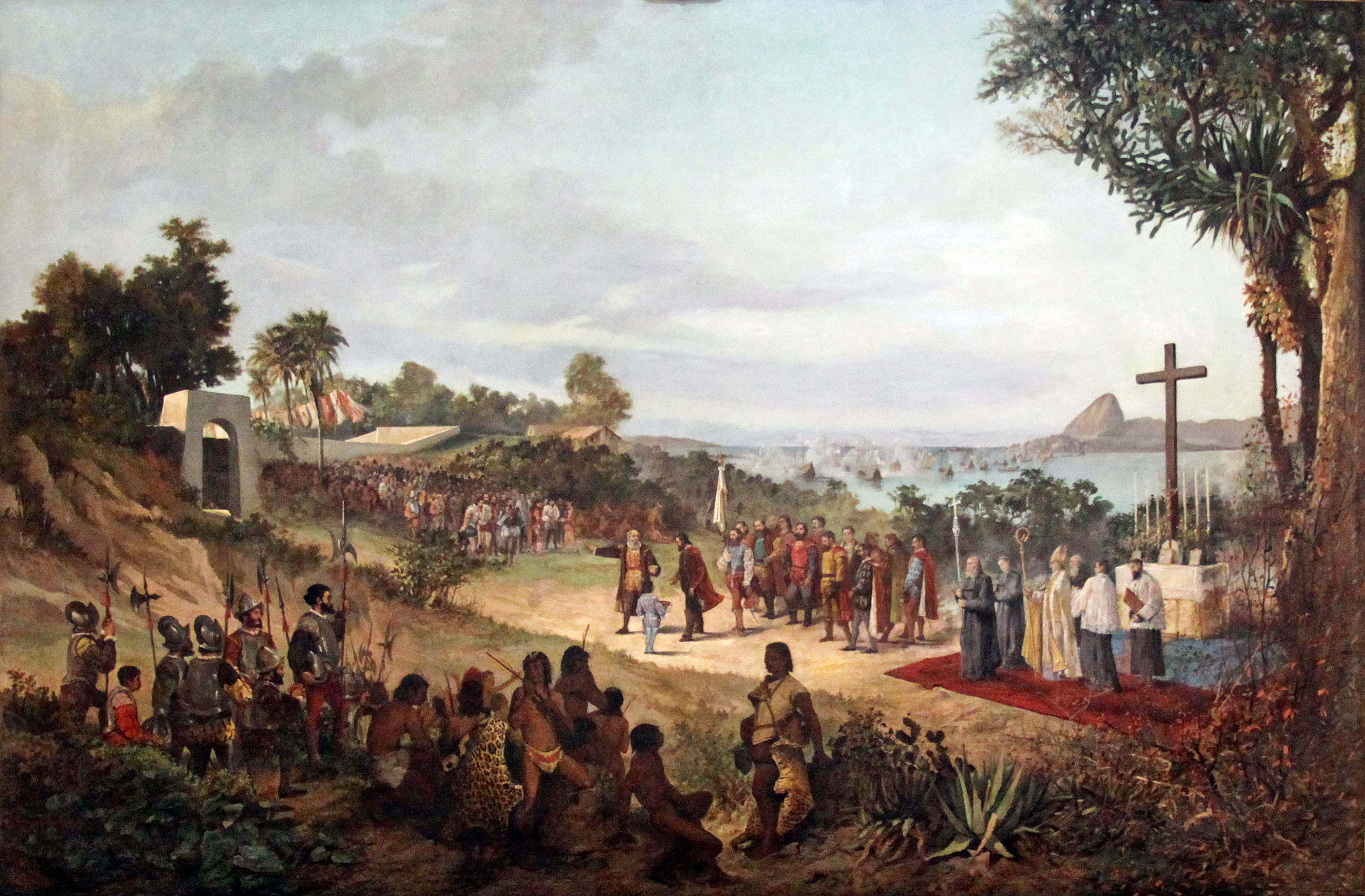 Quadro Fundação da Cidade do Rio de Janeiro. Autor: Antonio Firmino Monteiro (1855-1888). Dimensões 2,00 x 3,00.